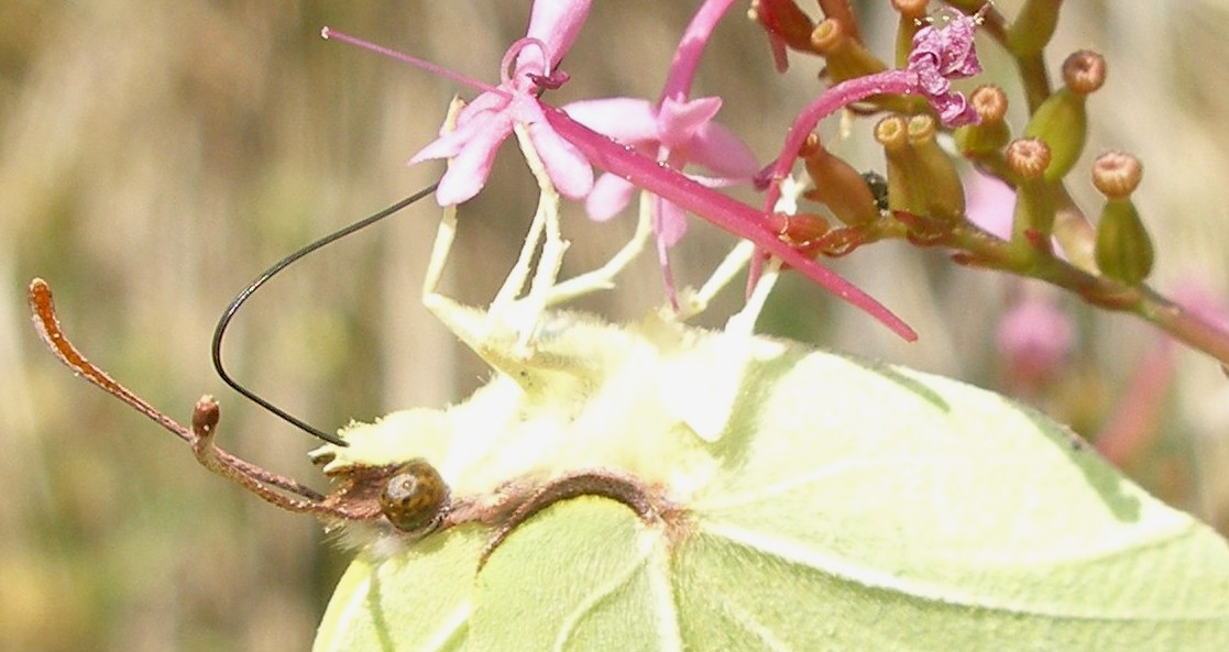 particolare del file Image:farfalla foglia.jpg spiritromba (proboscide) è inserita nel fiore per succhiarne il nettare.